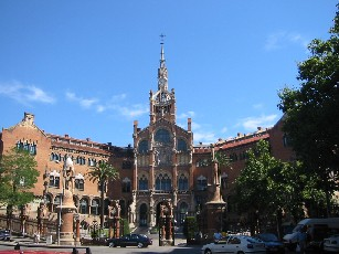 sant pau